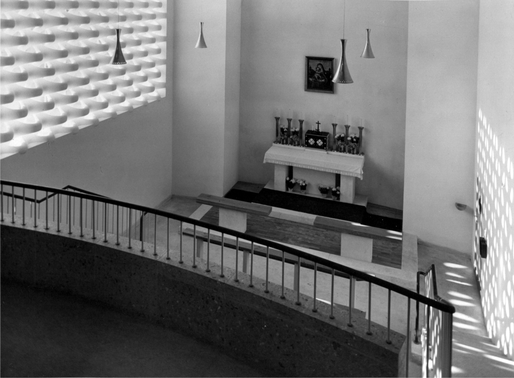 Wochentagskapelle der Pfarrkirche Liesing. Aufnahme von 1954. Der Architekt der Kirche war Robert Kramreiter, der Künstler, der die durchbrochene Wand an der linken Seite gestaltet hat, ist Erwin Hauer.